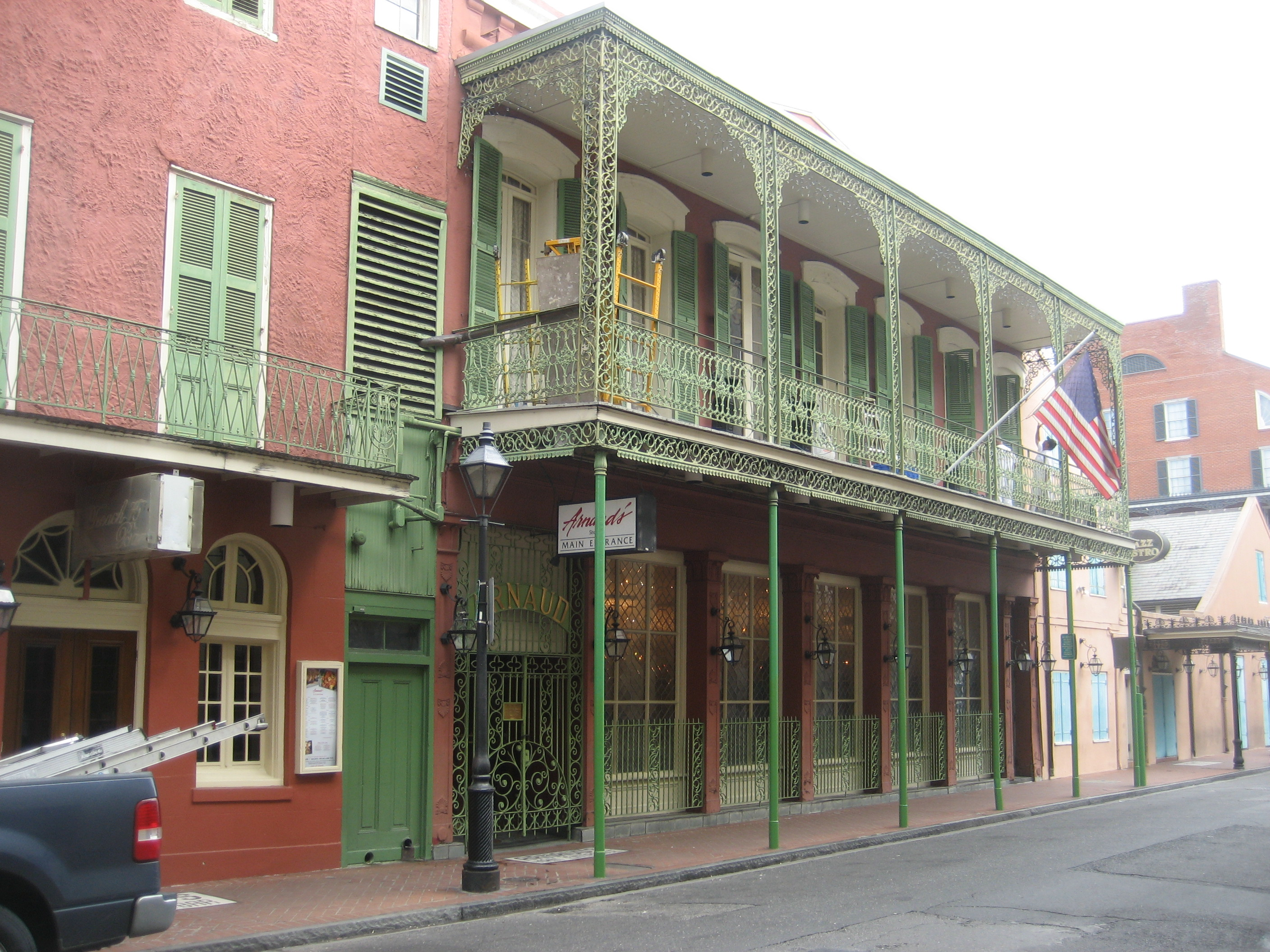 Arnaud's Restaurant, Bienville Street, French Quarter. New Orleans